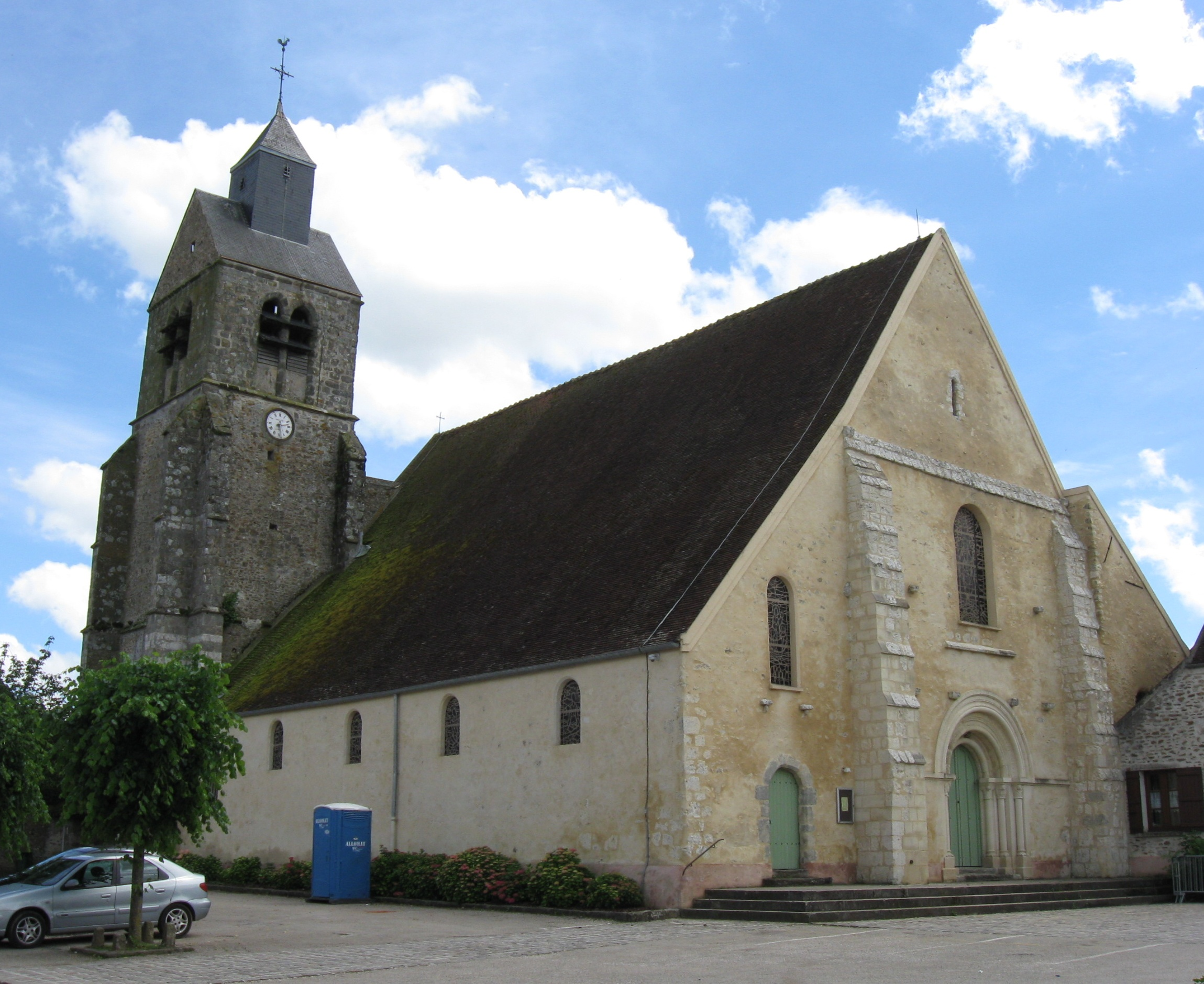 Église Saint-Pierre-et-Saint-Paul de Choisy-en-Brie. (Seine-et-Marne, région Île-de-France).